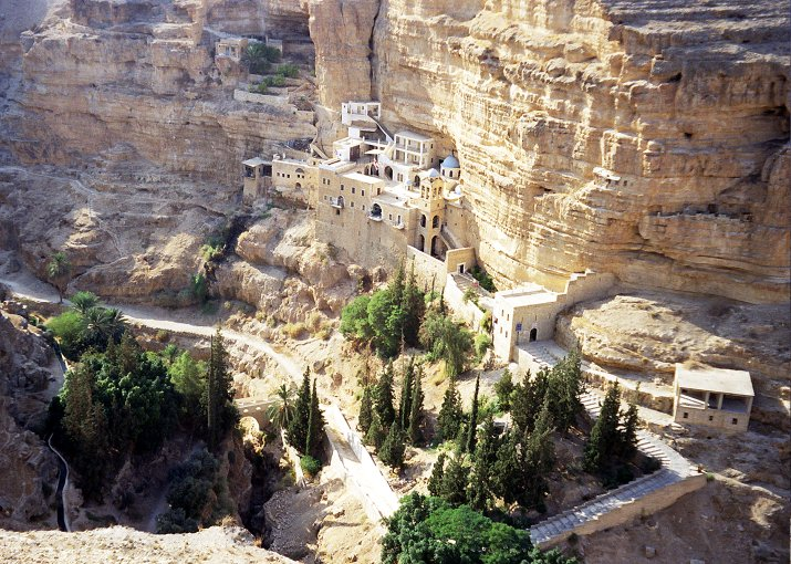 St. George Monastery in Israel - מנזר סנט ג'ורג'. צולם על ידי יואב רוזנברג. ירושלים.